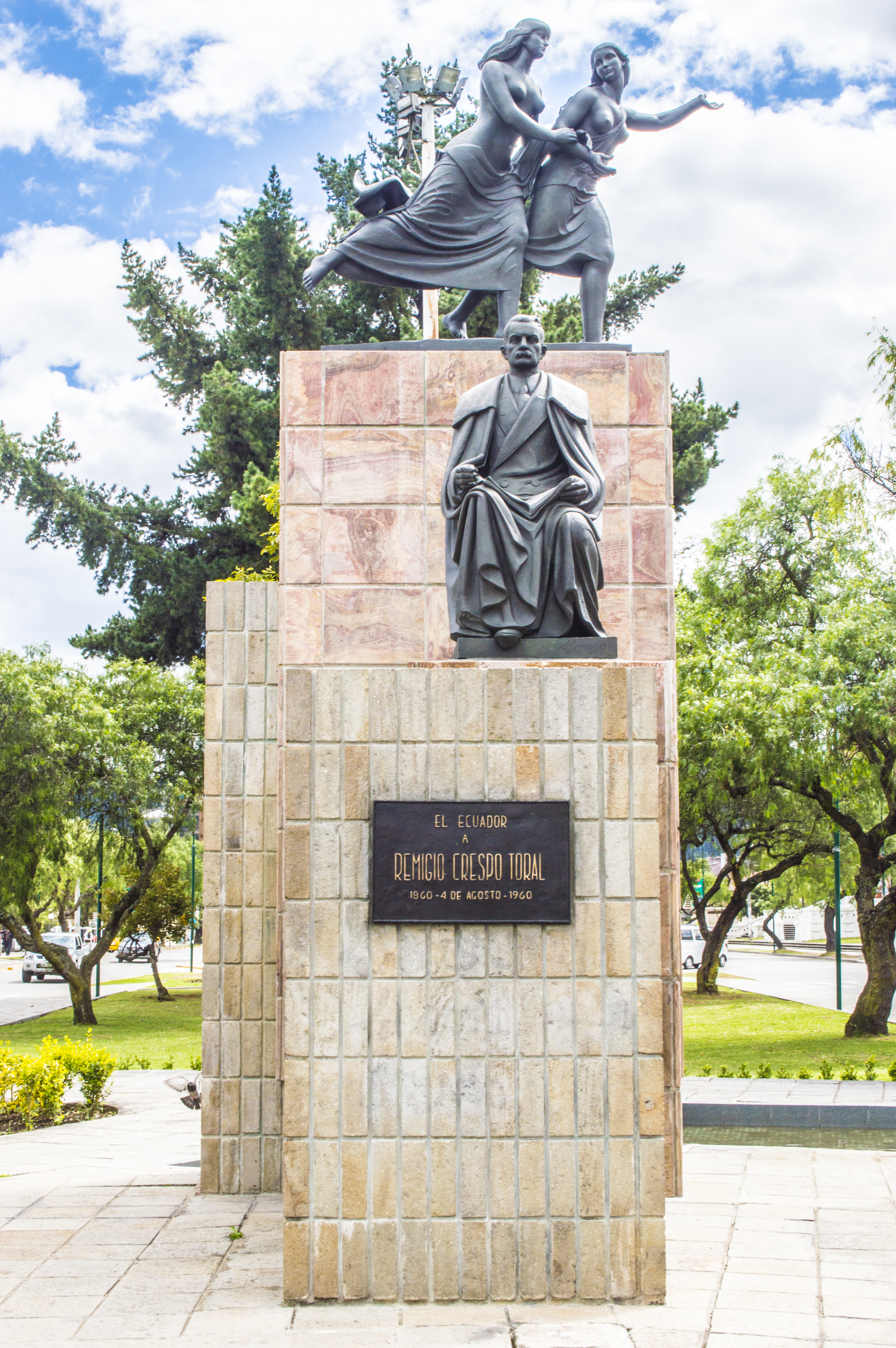 Estatua de Remigio Crespo Toral ubicado en la Av. Fray Vicente Solano de la ciudad de Cuenca, Ecuador.